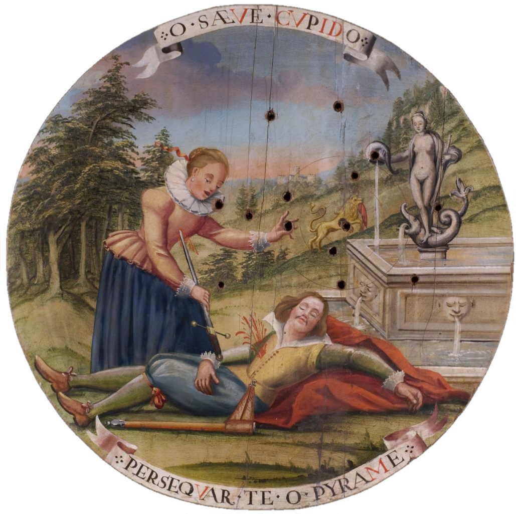 Bemalte Schützenscheibe mit griechischer Szene in höfischer Kleidung des 17. Jahrhunderts: Pyramus und Thisbe